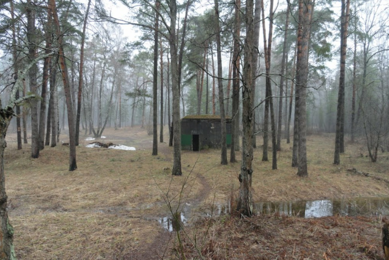 Noch vorhandener Eingangsbunker zum ehemaligen Führerhaupquartier (FHQ) Bärenhöhle bei Smolensk in Rußland. Aufnahme 2013